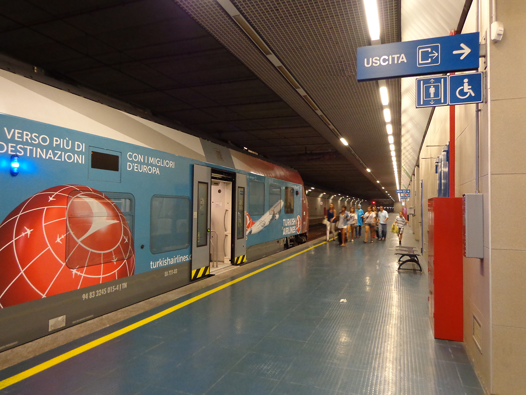 Treno Malpensa Express, effettuato da un elettrotreno serie E.720 di Trenord, fermo nella stazione di Ferno-Lonate Pozzolo